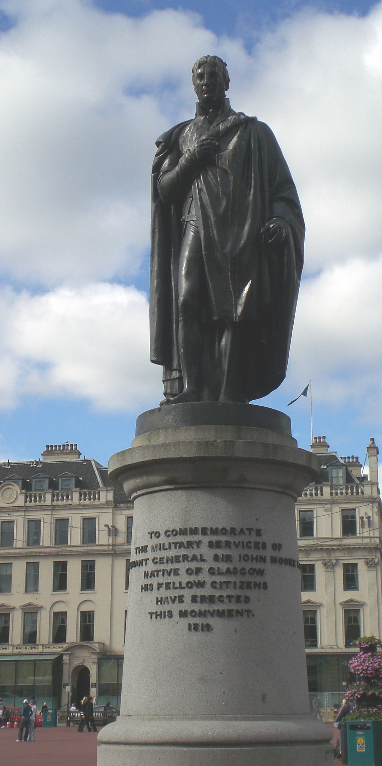 Monumento a John Moore na George Square de Glasgow